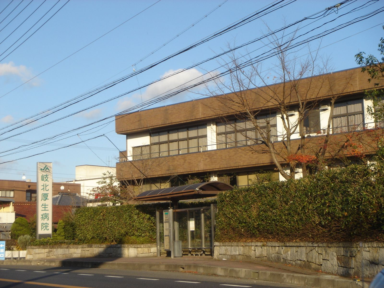 Gihoku Kosei Hospital（岐北厚生病院）,Yamagata,Gifu,Japan(岐阜県山県市)で撮影。